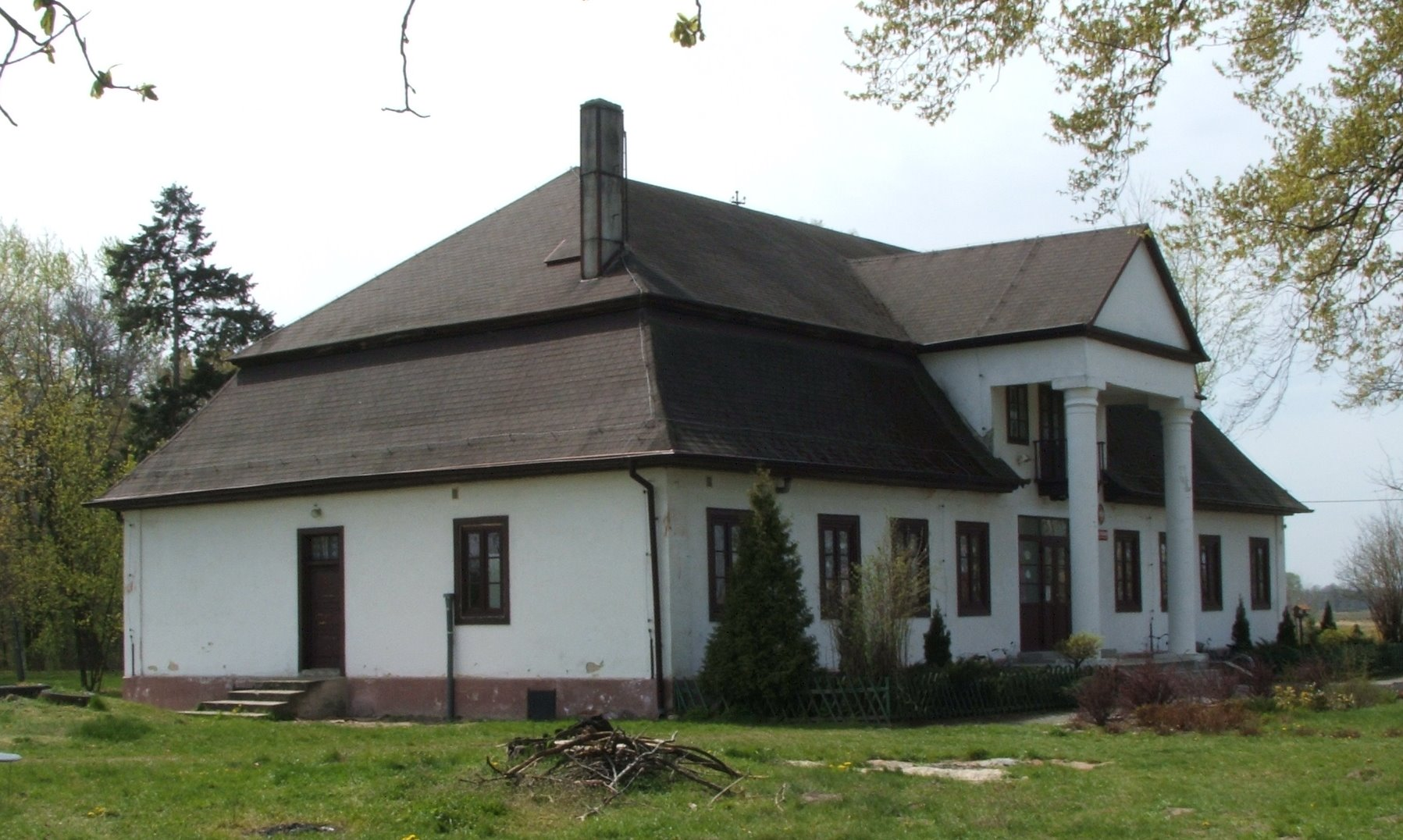 Permission: "Wykorzystanie tych zdjęć zostawiam do Pana wyboru, ja oświadczam, że zrzekam się do nich wszelkich praw." (The usage of these photos is up to you, I state that I release all the rights.)